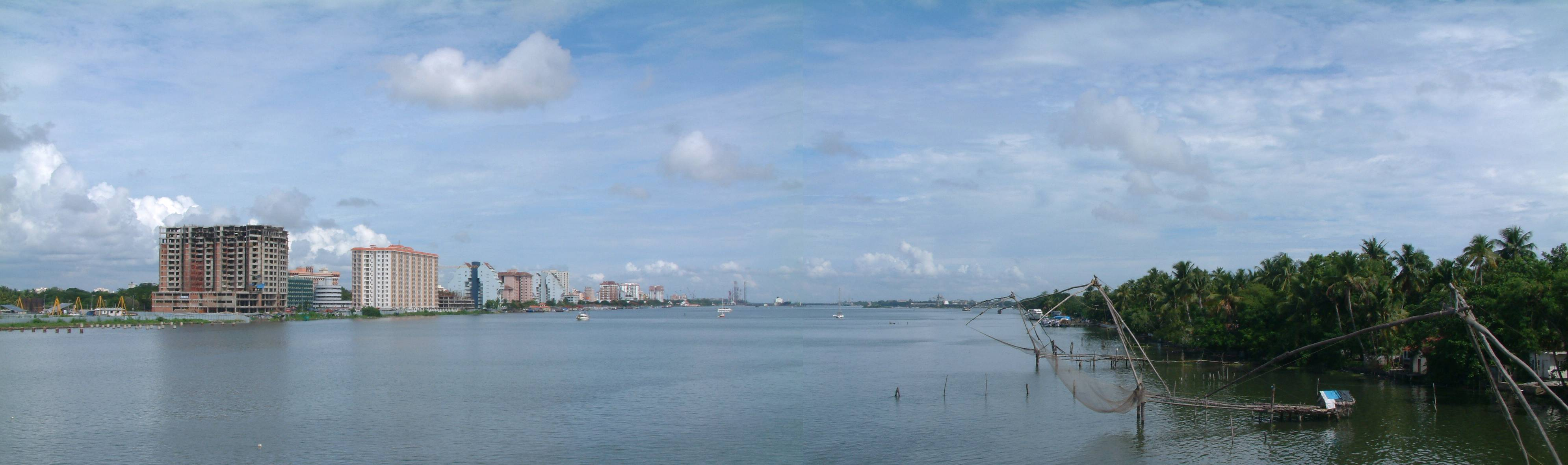 cochin_kerala_ India